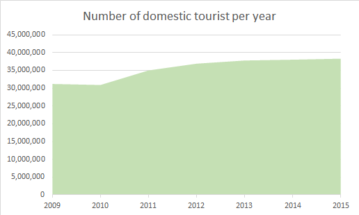 2009년 부터 2015년 까지 년도별 한국 국내 관광객 수